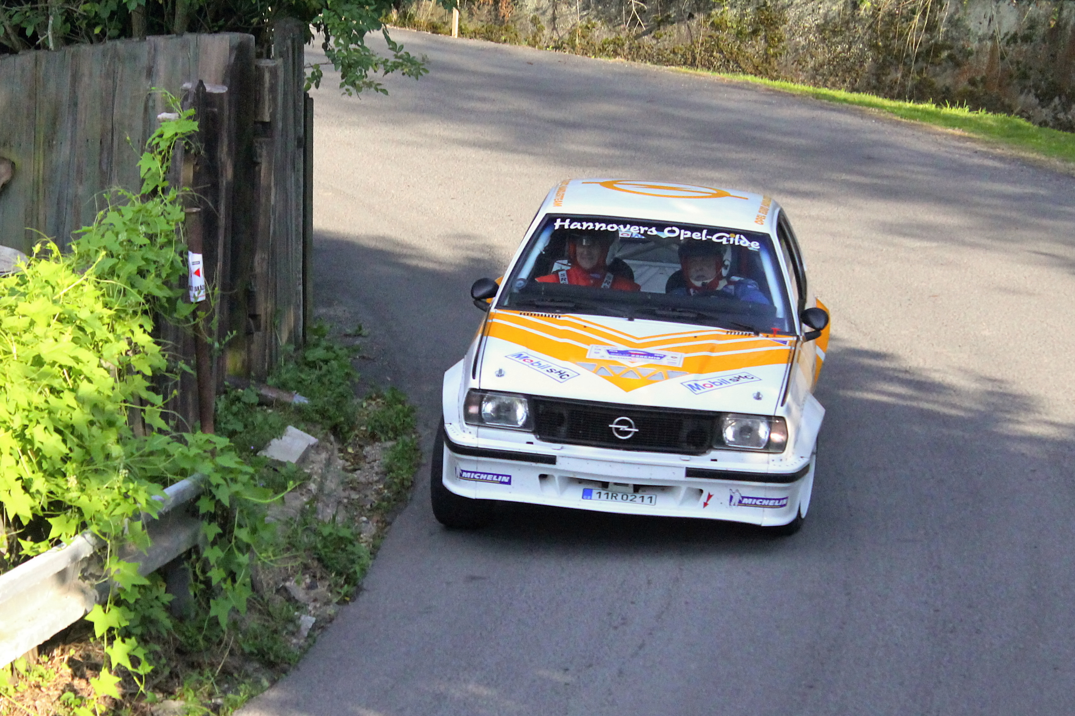 Opel Ascona 400, Rally Bohemia Legend 2013